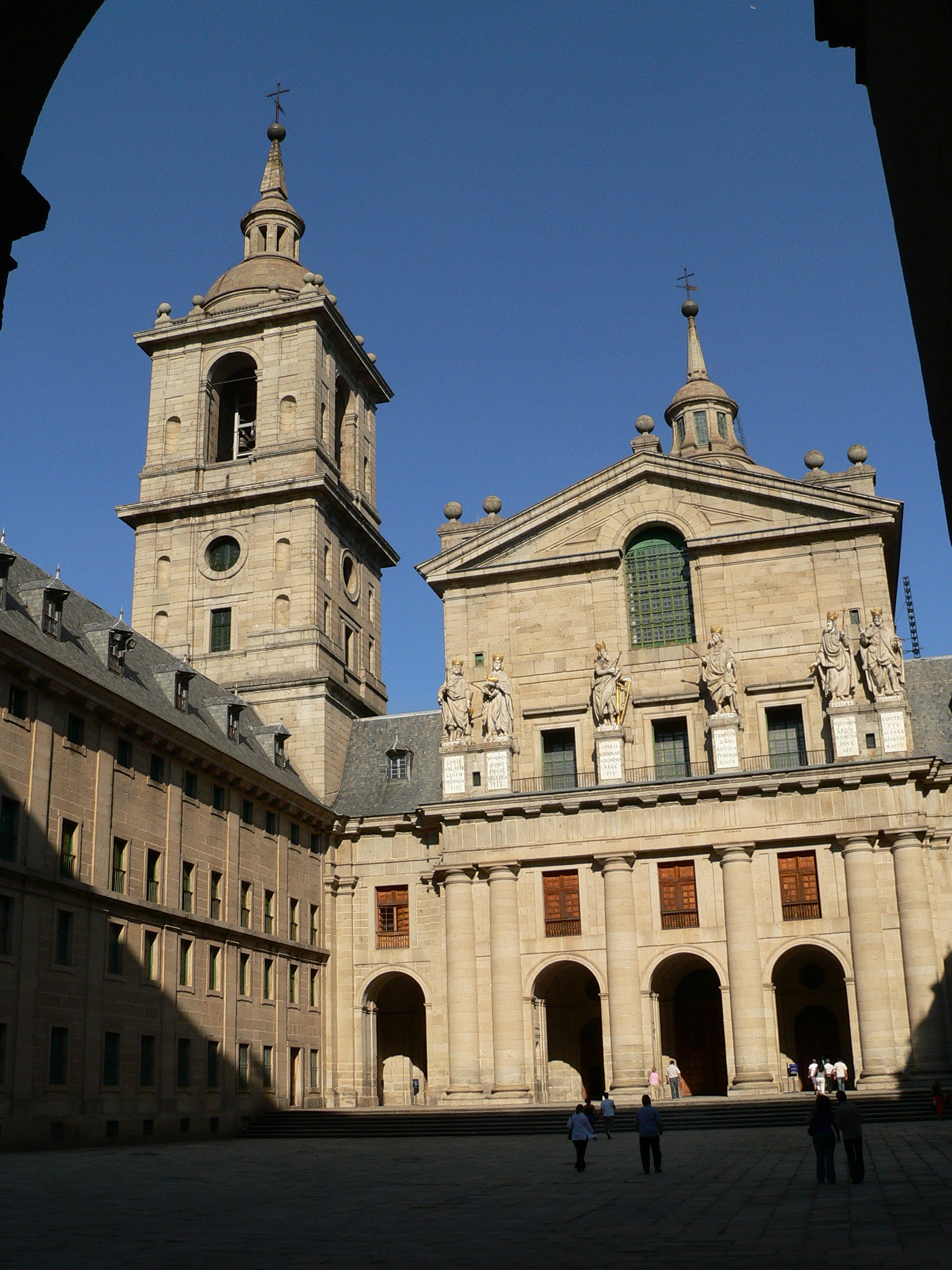 Fachada de la Basílica de El Escorial Description: Basilica Subject: El Escorial Basilica City : El Escorial Country : Spain Photographer: © Manuel González Olaechea y Franco Shot date : August, 13th, 2006